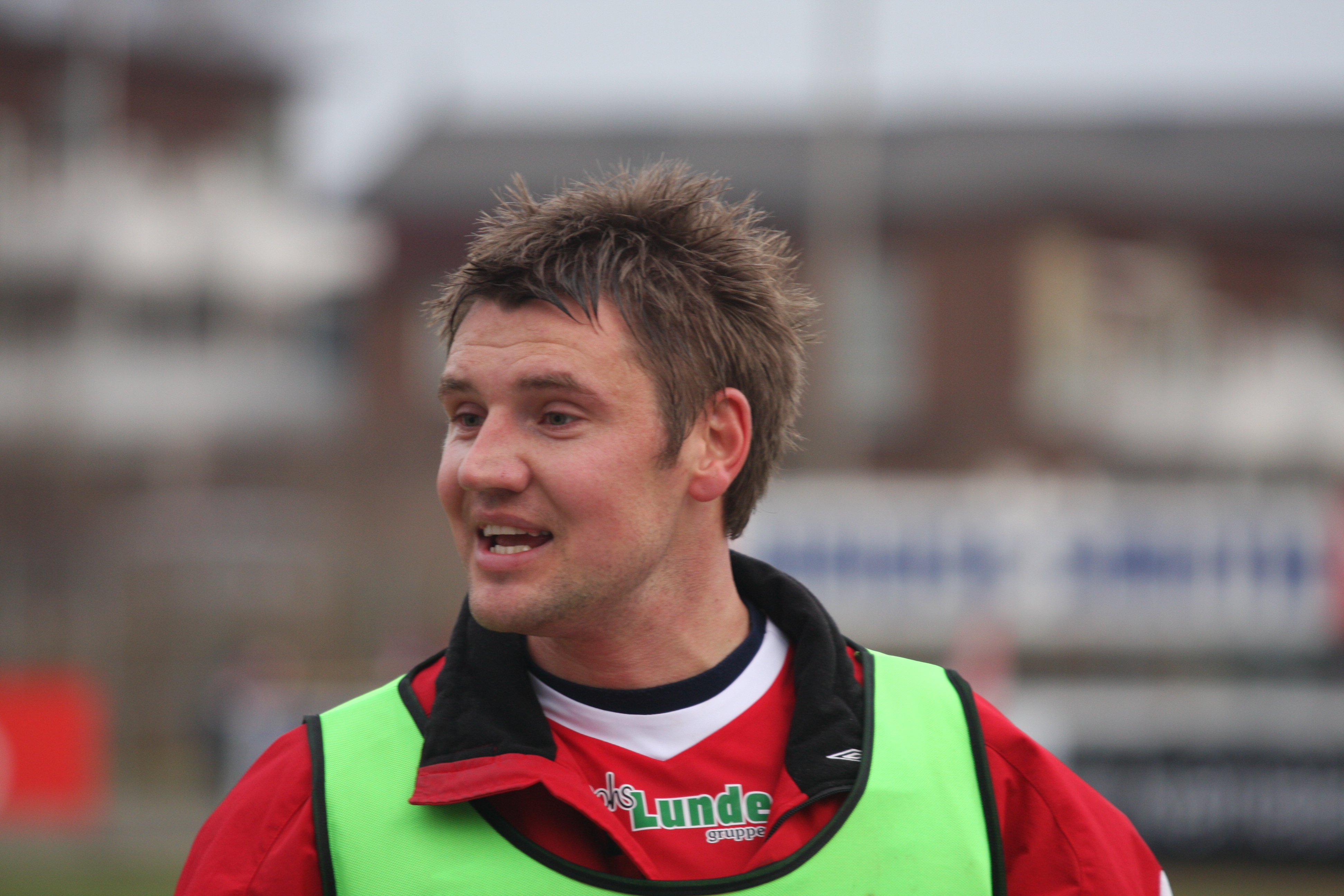 Kai Ove Stokkeland at Bryne stadion